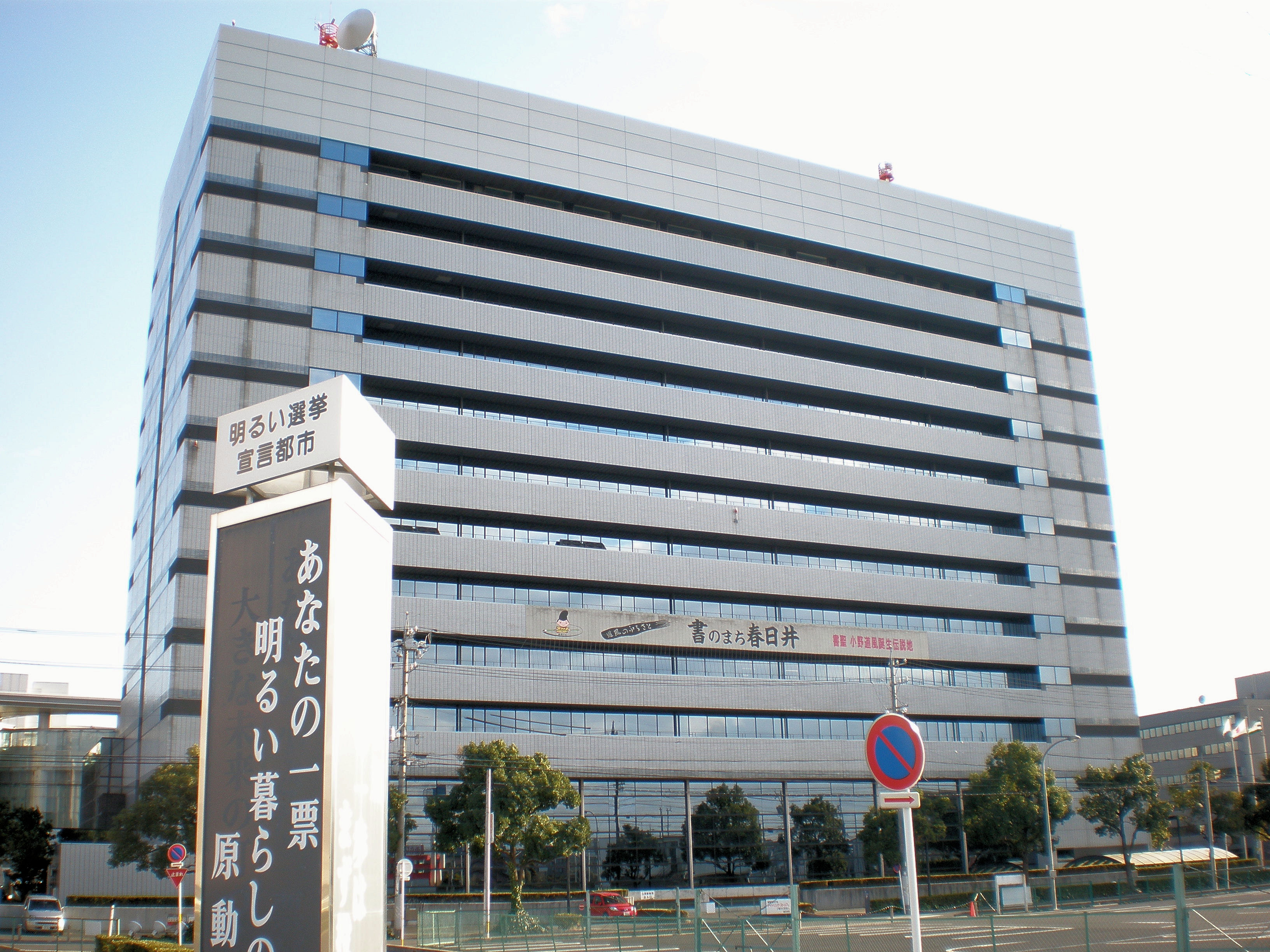 春日井市役所（ソフトウェアにて一部修正）